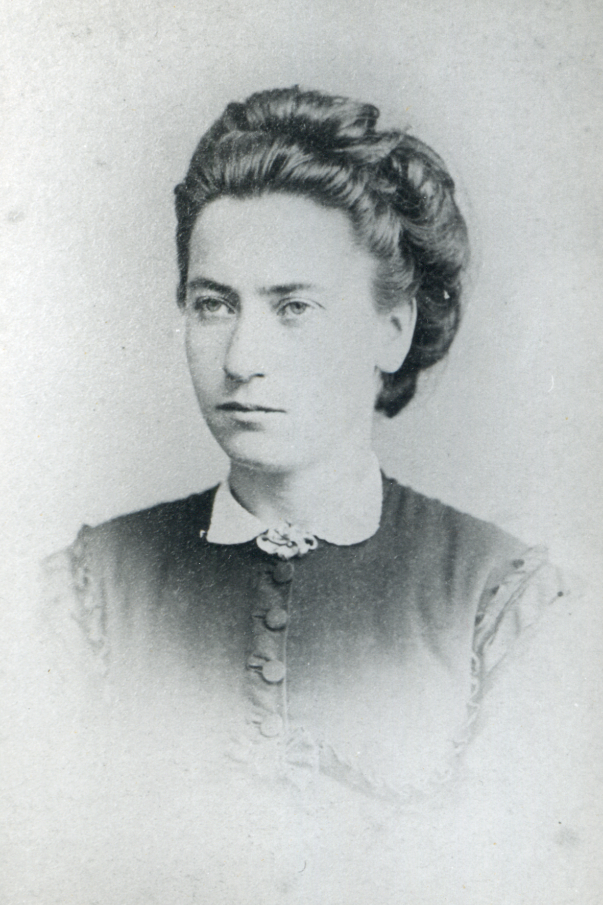 Christense Sandnes , datter av Johan Augistinussen